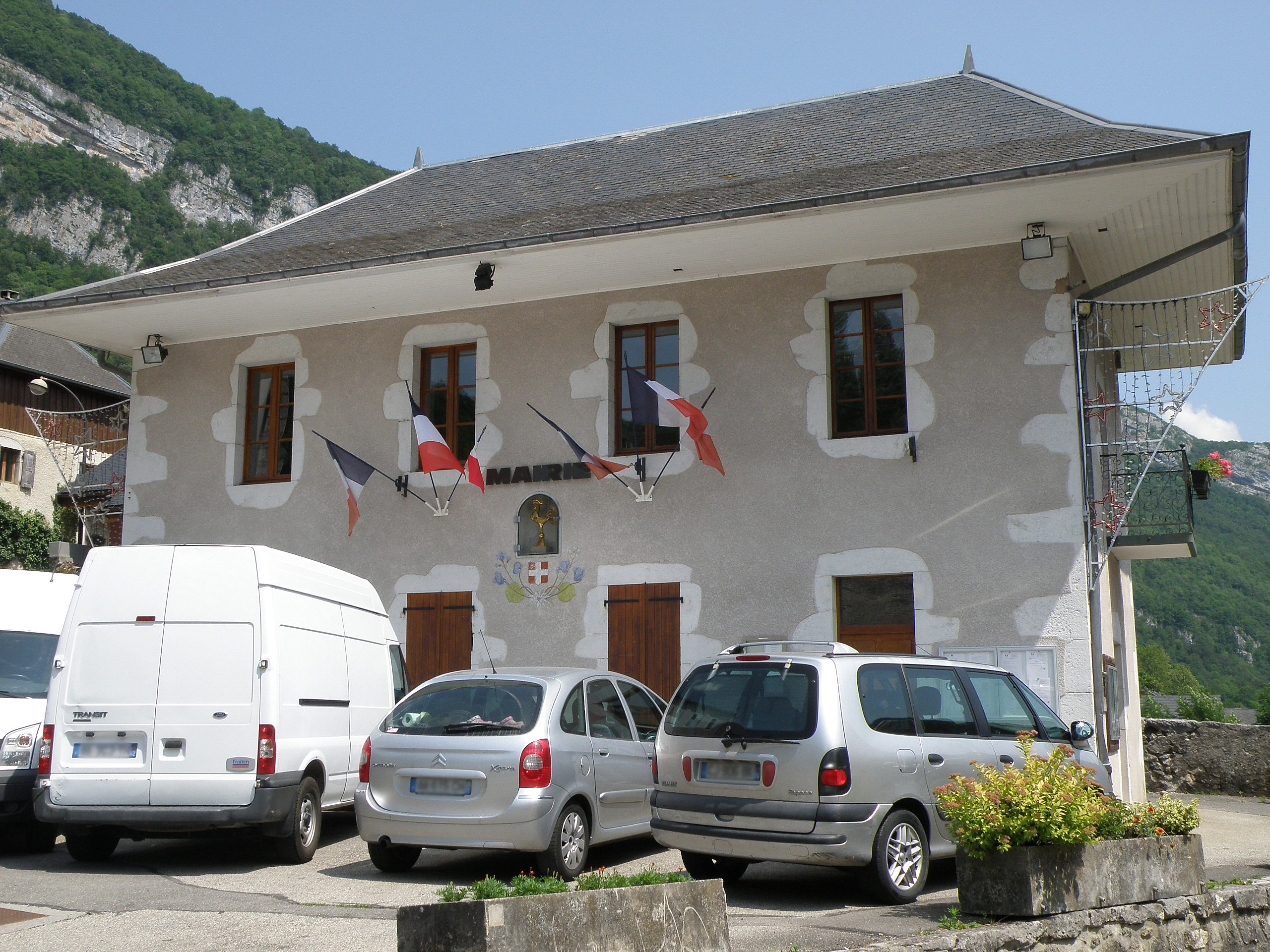 Allèves, commune du département de la Haute-Savoie (région Rhône-Alpes, France). Mairie.